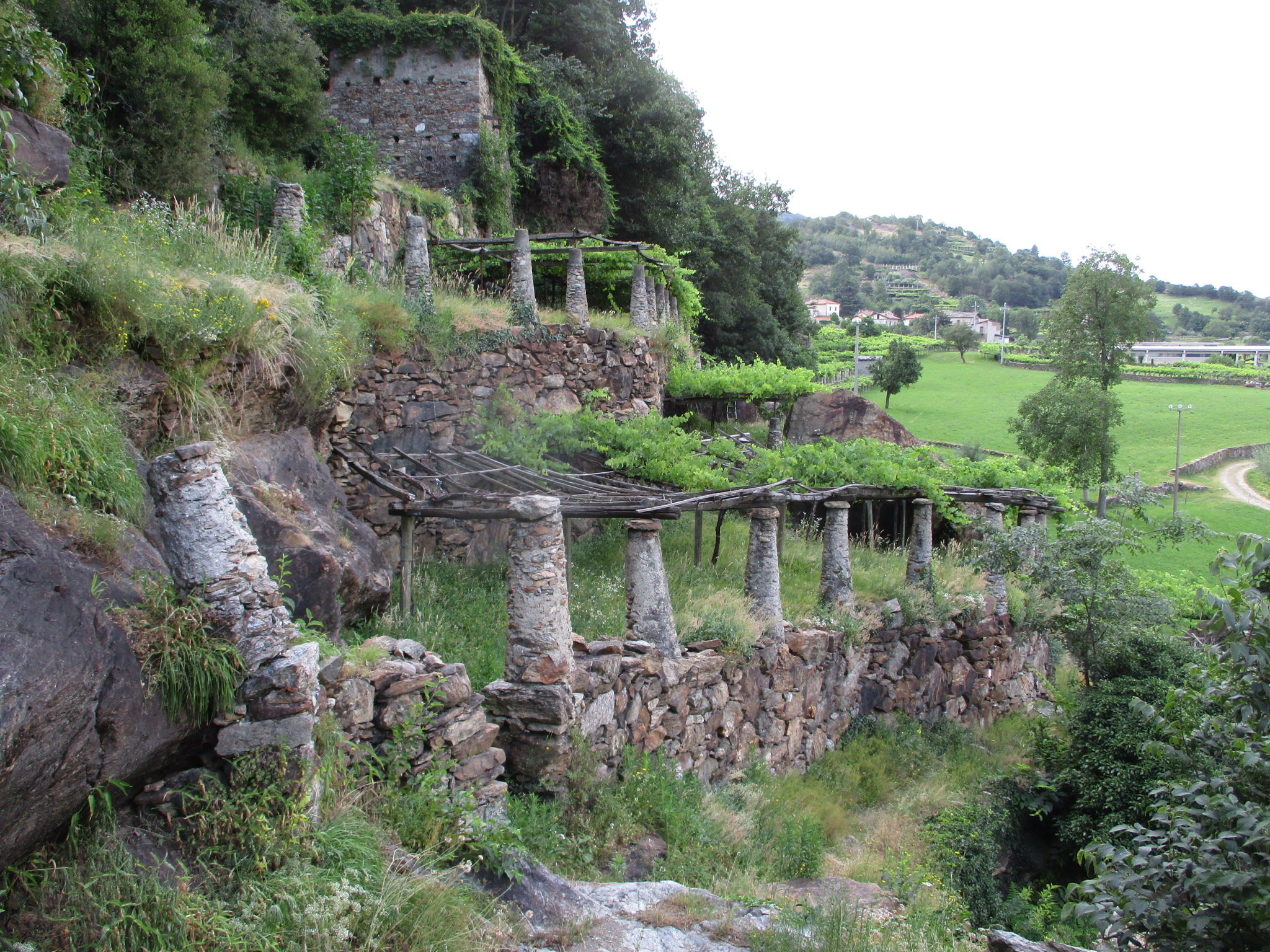 Vineyards in Aosta Valley